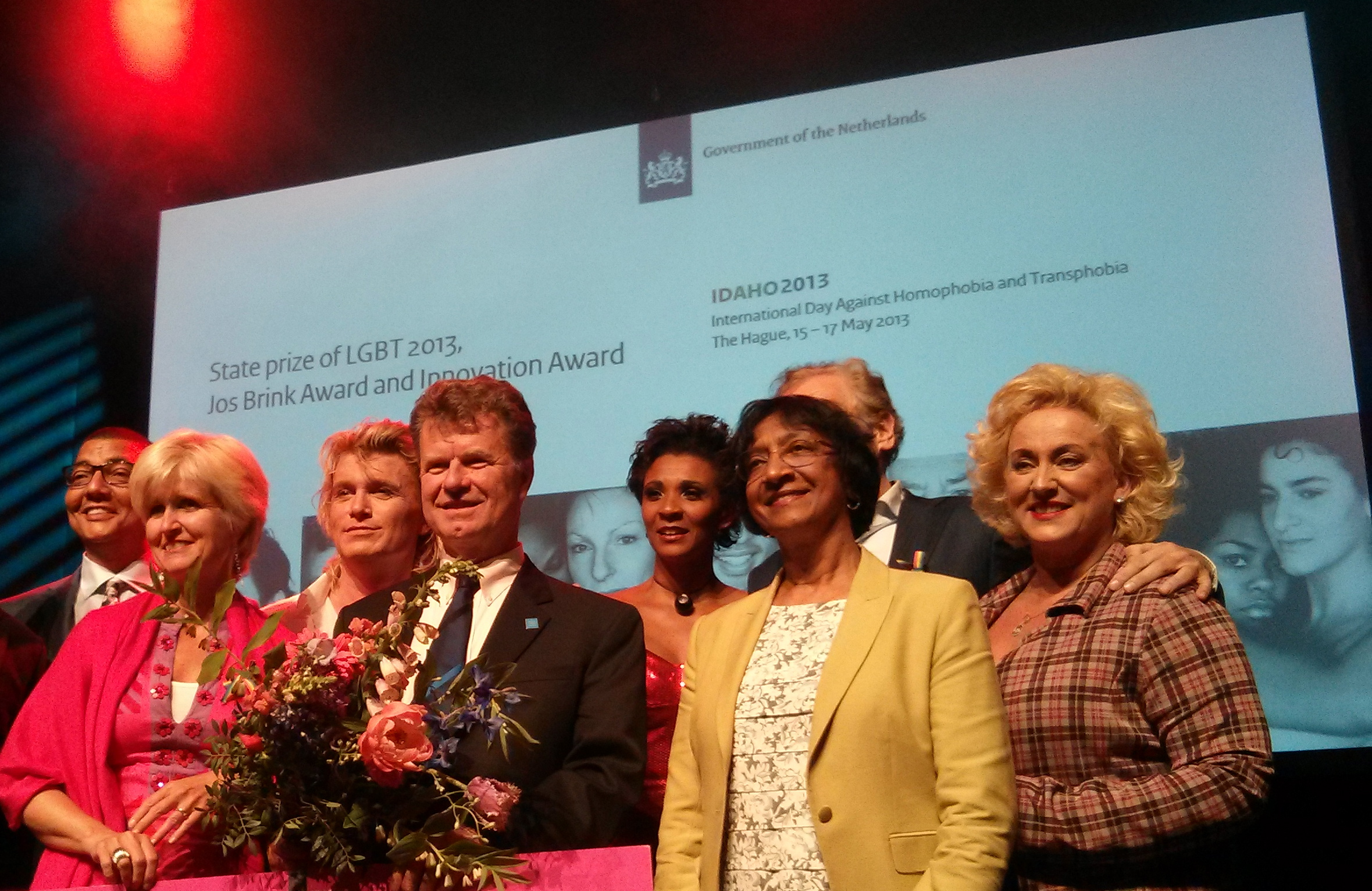 Boris Dittrich, advocacy director for the Lesbian, Gay, Bisexual, and Transgender Rights Program at Human Rights Watch, at the reception for the Jos Brink Award and Innovation Award in The Hague, The Netherlands, on May 17, 2013.